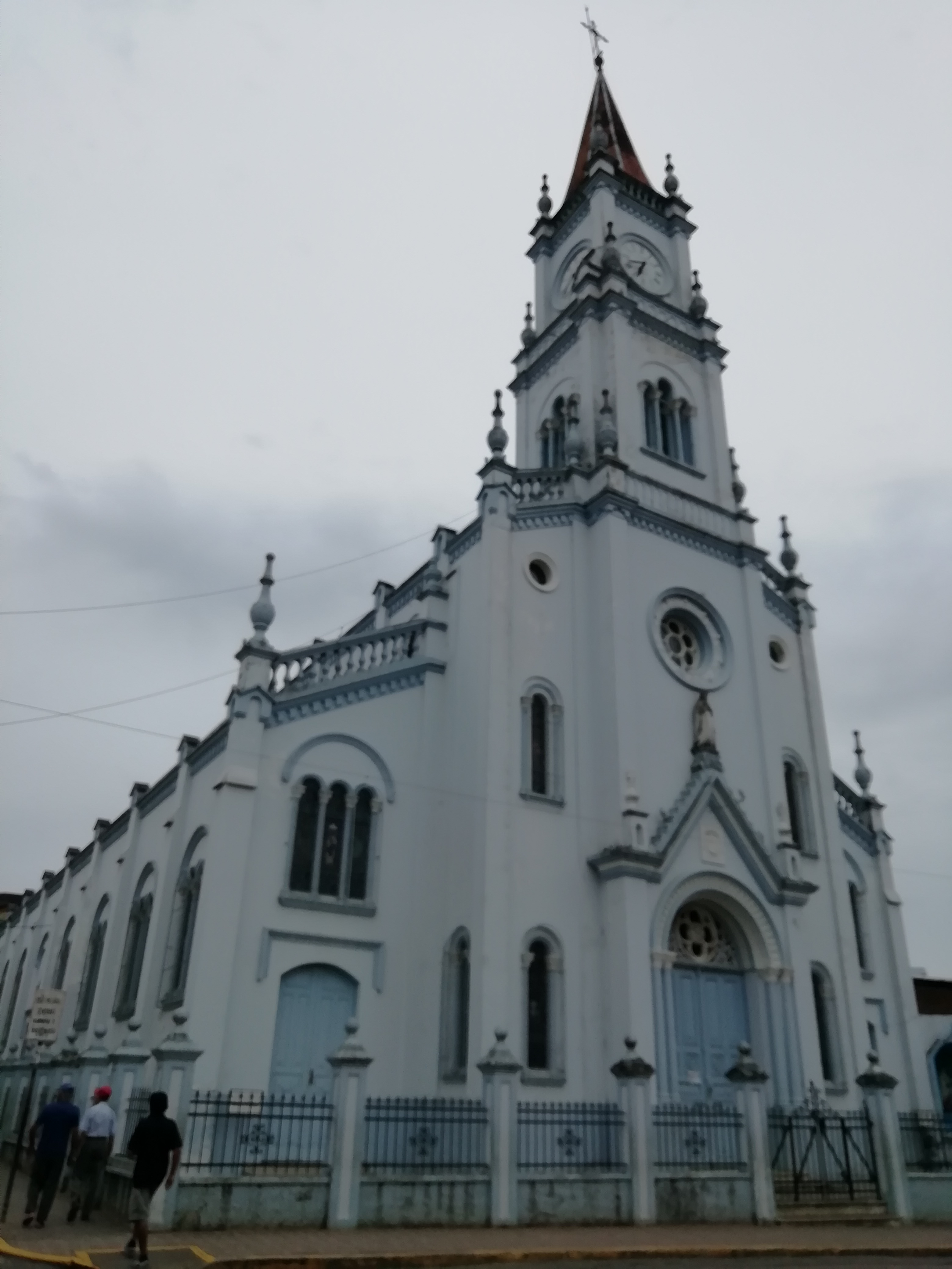 Iglesia de Yurimaguas, Perú.